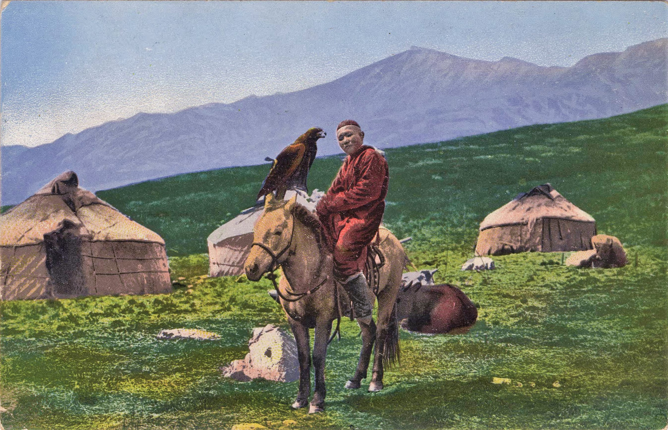 Казах на лошади с беркутом на фоне юрт. Долина реки Аракан, притока Черной Берели